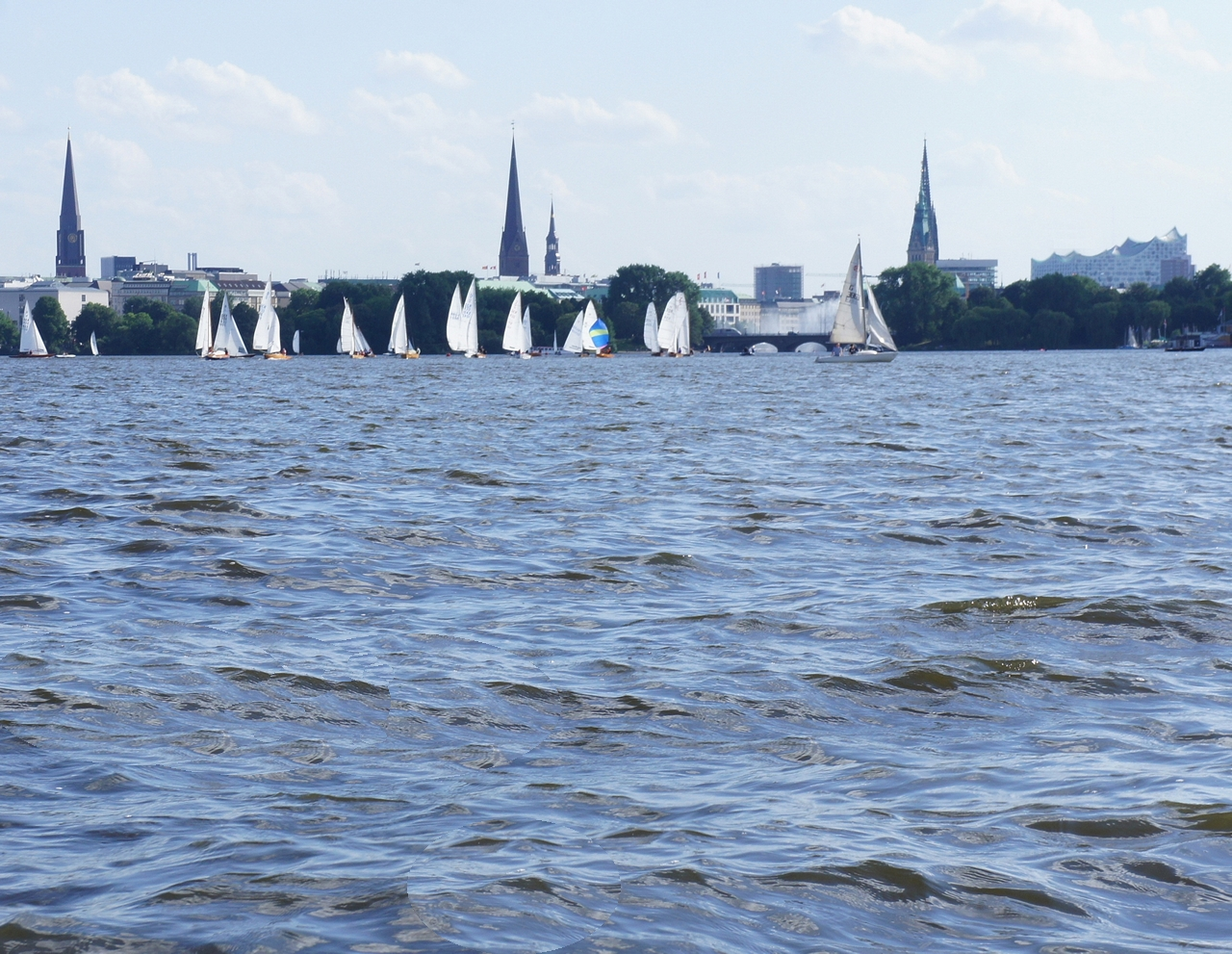 vom Tretboot aus gesehen : von links nach rechts : St Jakobi, St Petri, St Katarinnen, das Rathaus vor St Nikolaï + die Elbphilharmonie